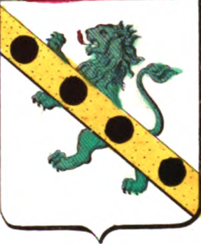 Armes de la famille Pitteurs de Budingen